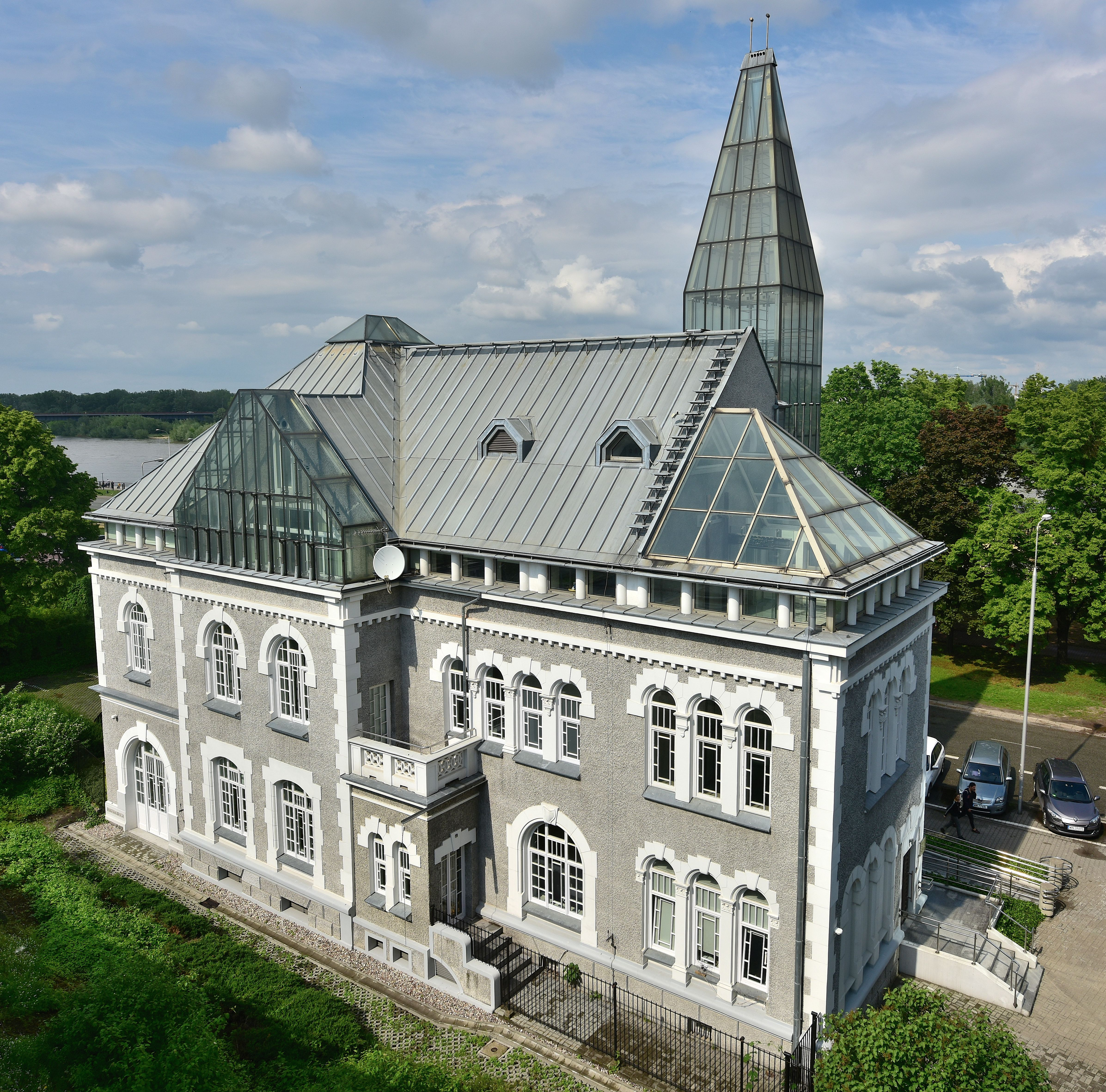 Szara Willa w Warszawie, widok z Biblioteki Uniwersytetu Warszawskiego